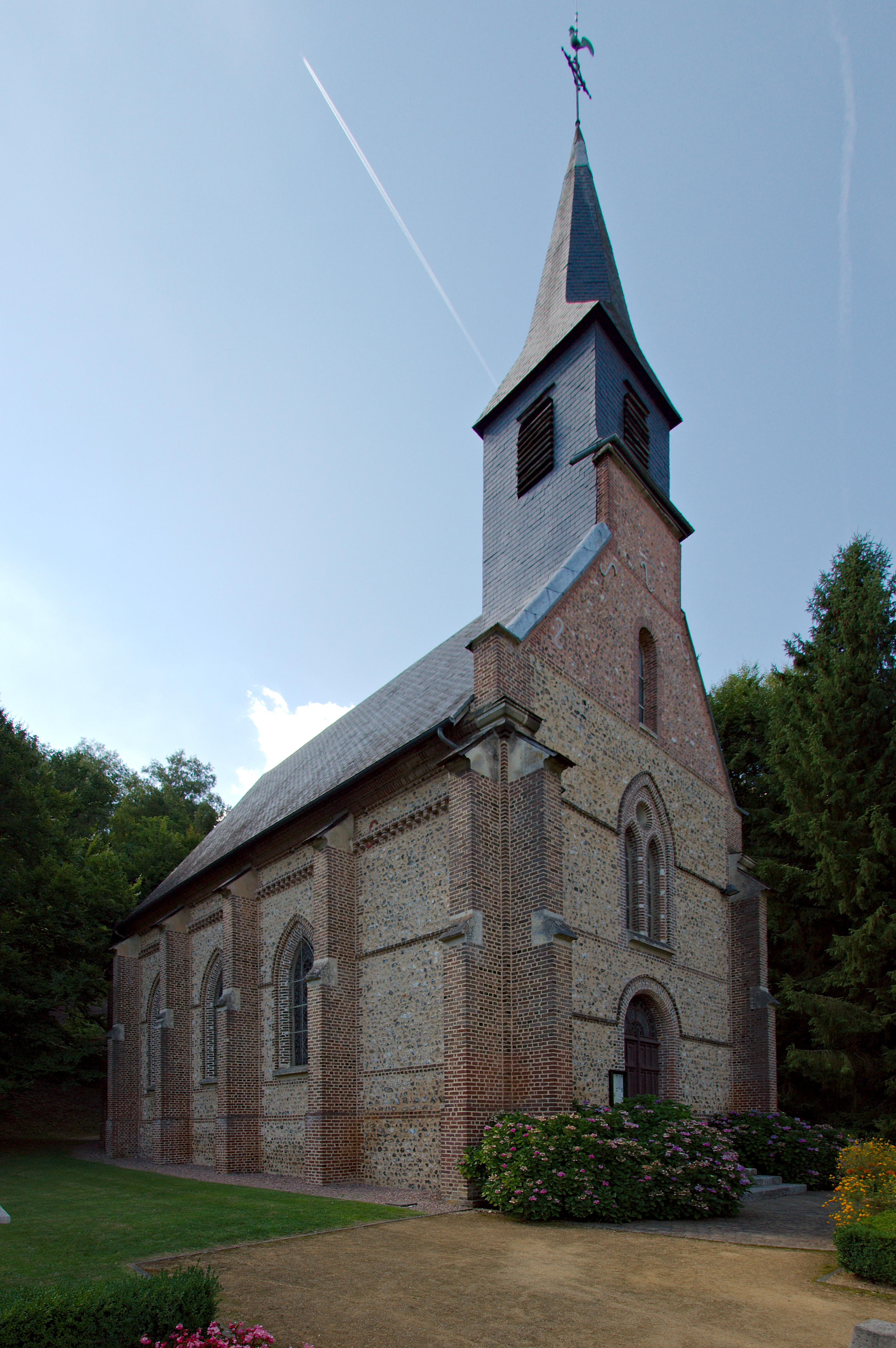 Église Saint-Pierre de Fontaine-sous-Préaux, route des Sources